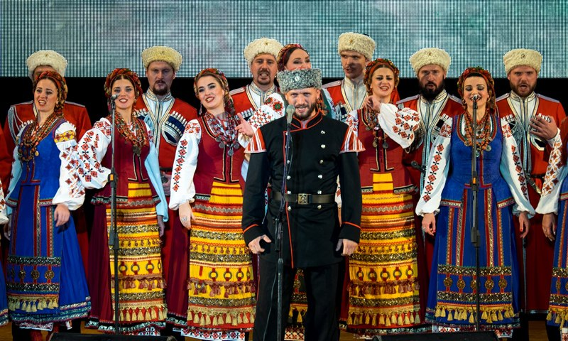 concert of the Kuban Cossack Choir, soloist - Viktor Sorokin